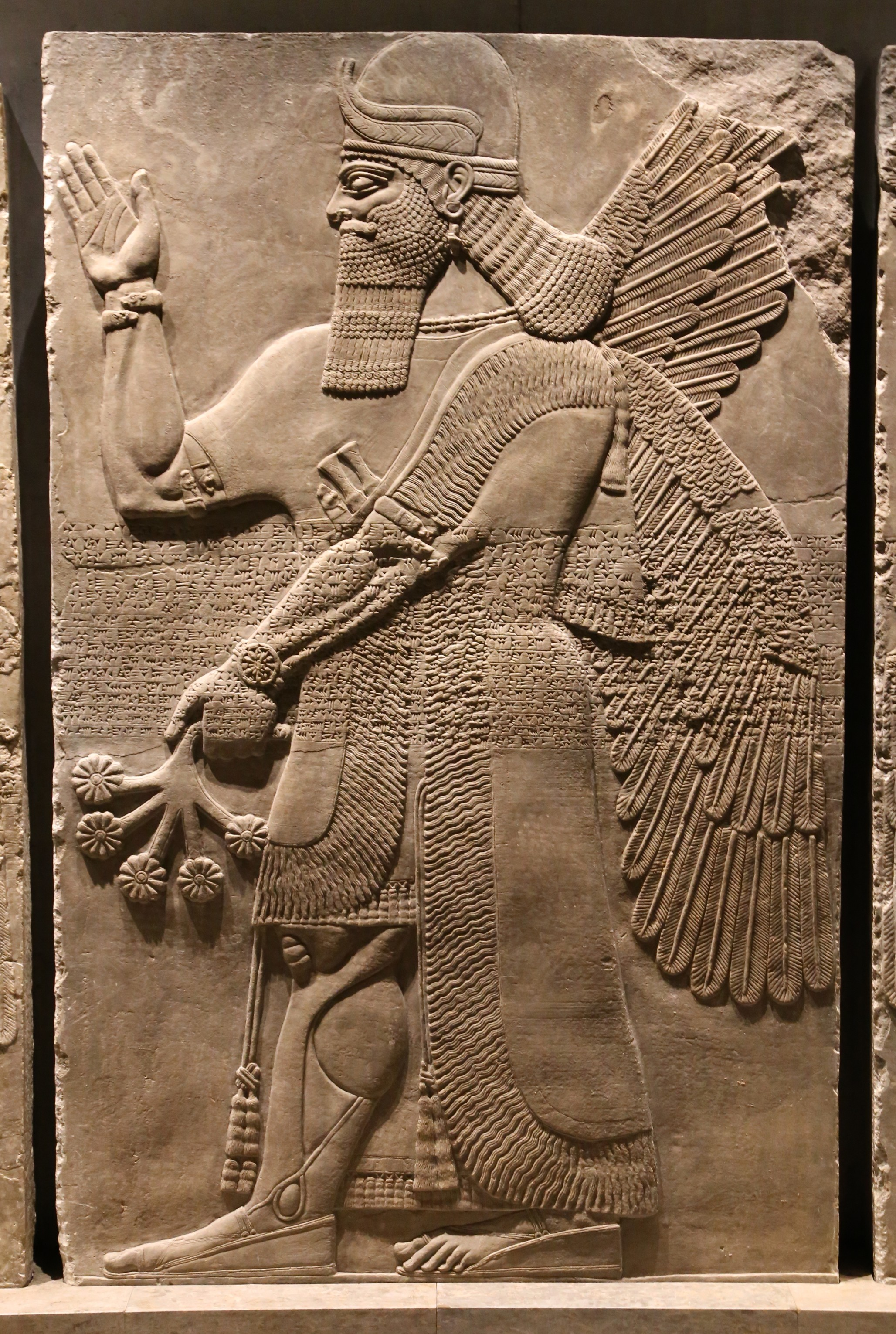 Geflügelte bärtige Genien mit verschiedenen Attributen, Nimrud, Nordwestpalast des Königs Assurnasirpal II., um 870 v. Chr., Mossulalabaster